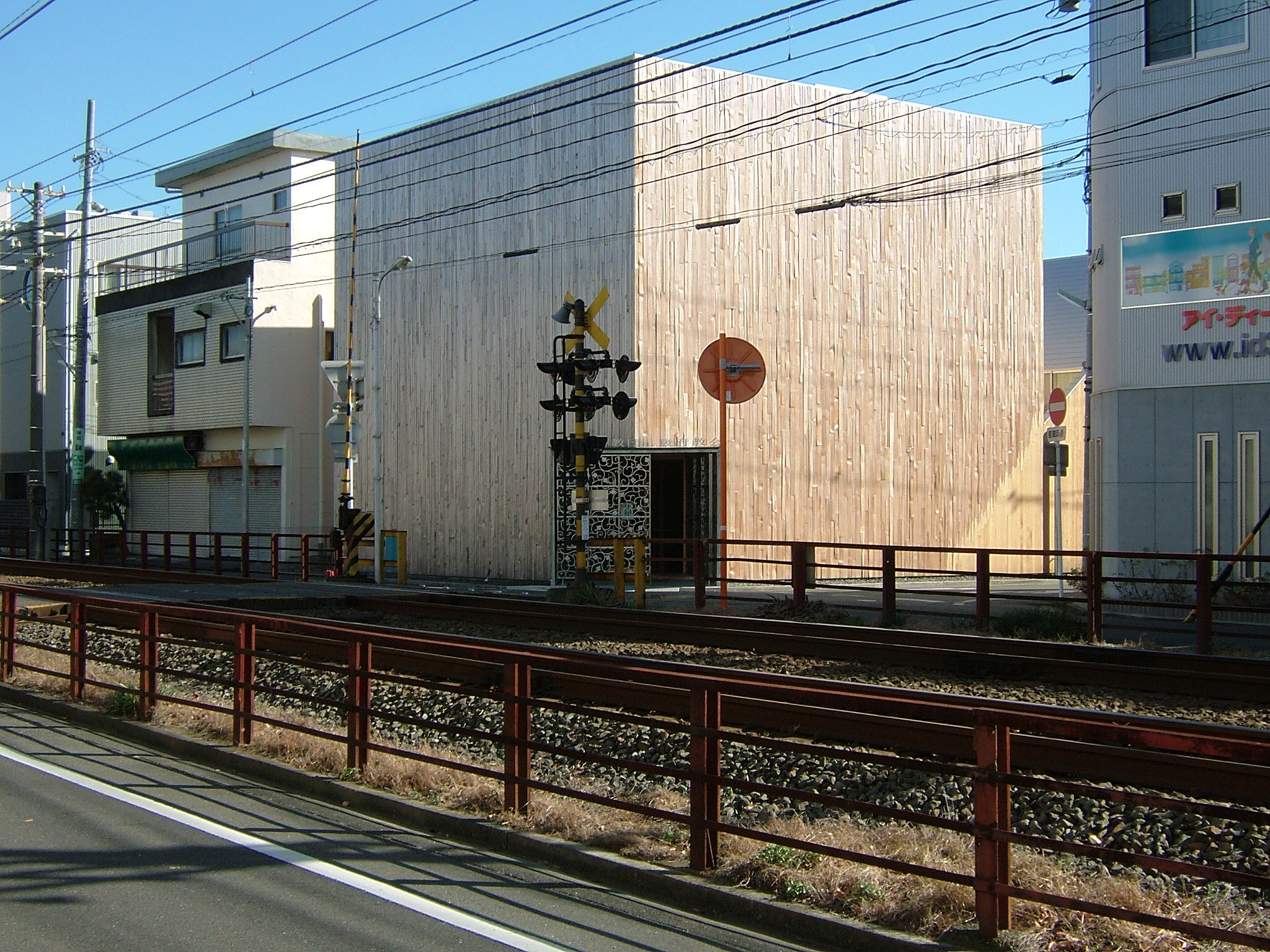 静岡市葵区、駿府教会外観（静鉄線路越しに撮影）